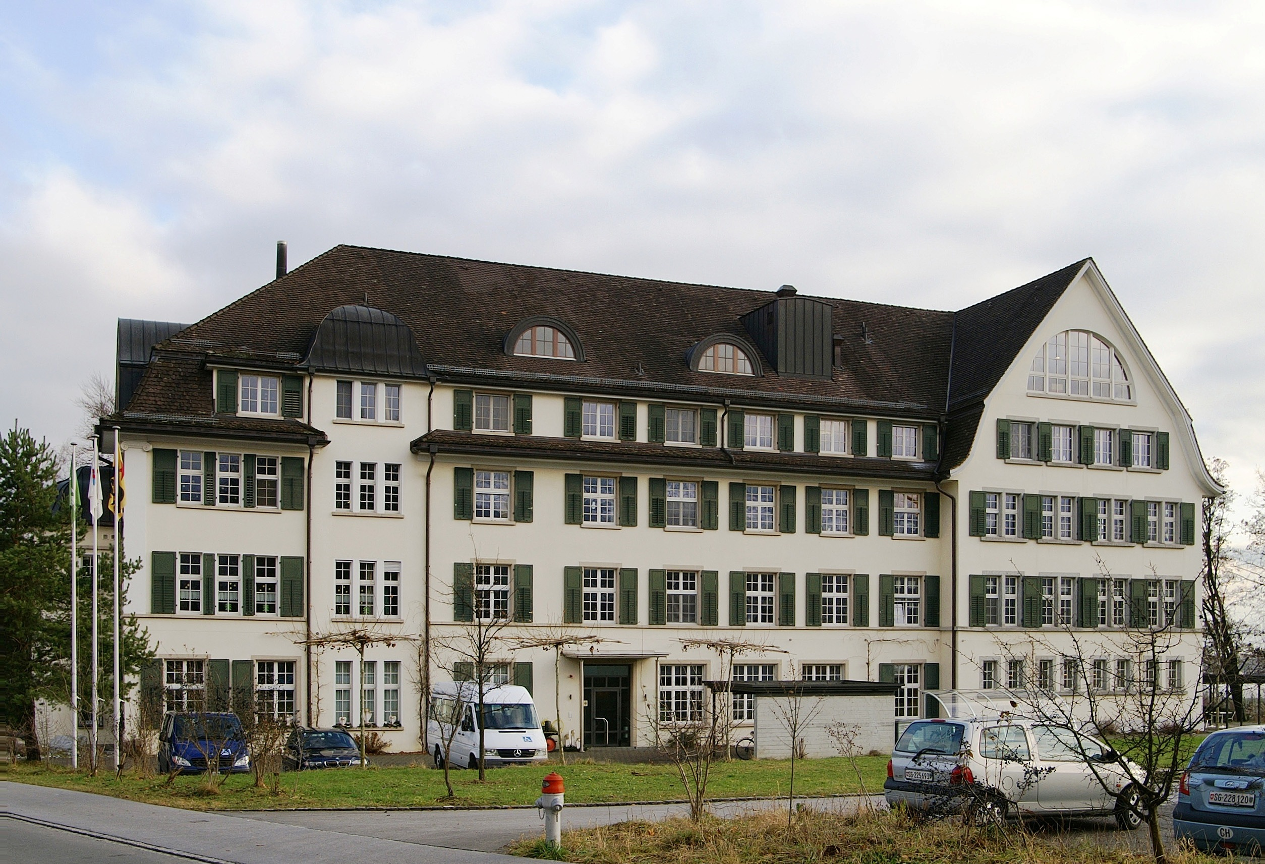 (Pflegeheim) Bürgerheim Kirlen Altstätten an der Alte Landstrasse. Ehemals ein Kloster, erbaut 1903